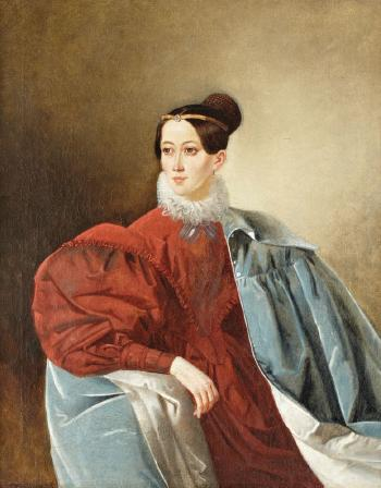 Княгиня Елизавета Ивановна Кропоткина, ур. Дорохова (6.IX.1803—3.IV.1836), сестра Руфина Ивановича Дорохова (1801—1852); жена капитана князя Д. П. Кропоткина (1801—1837)